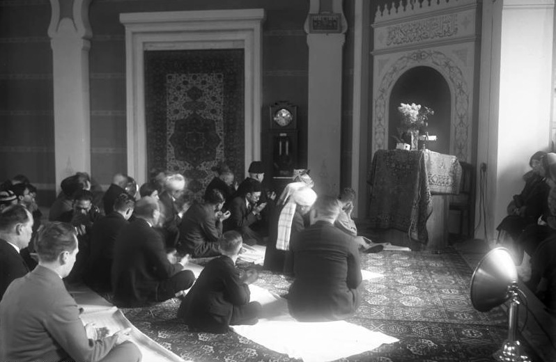 Das Ramadan-Fest der deutsch-muslimischen Gesellschaft in der türkischen Moschee in Berlin ! Muslimische Gläubige während des Gottesdienstes in der Moschee